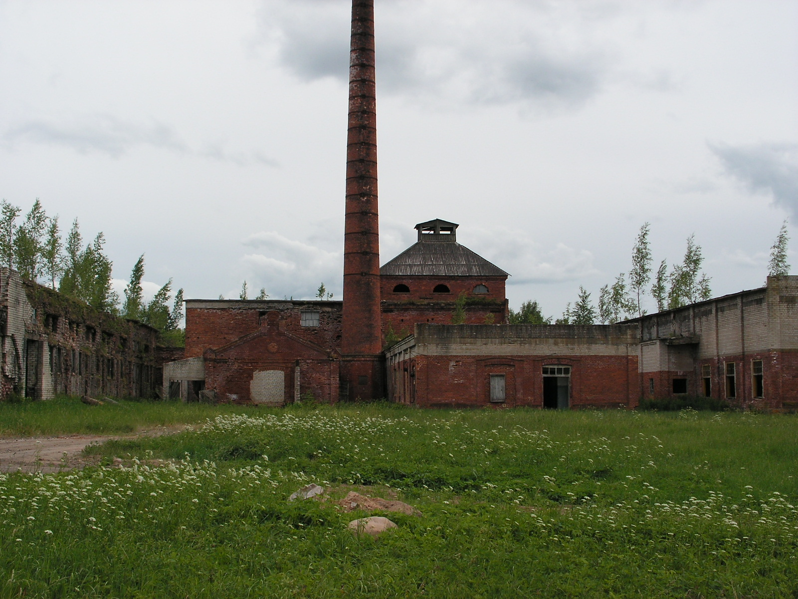 Abja linavabriku varemed 2011. aastal (Foto: Raimo Ilsjan).